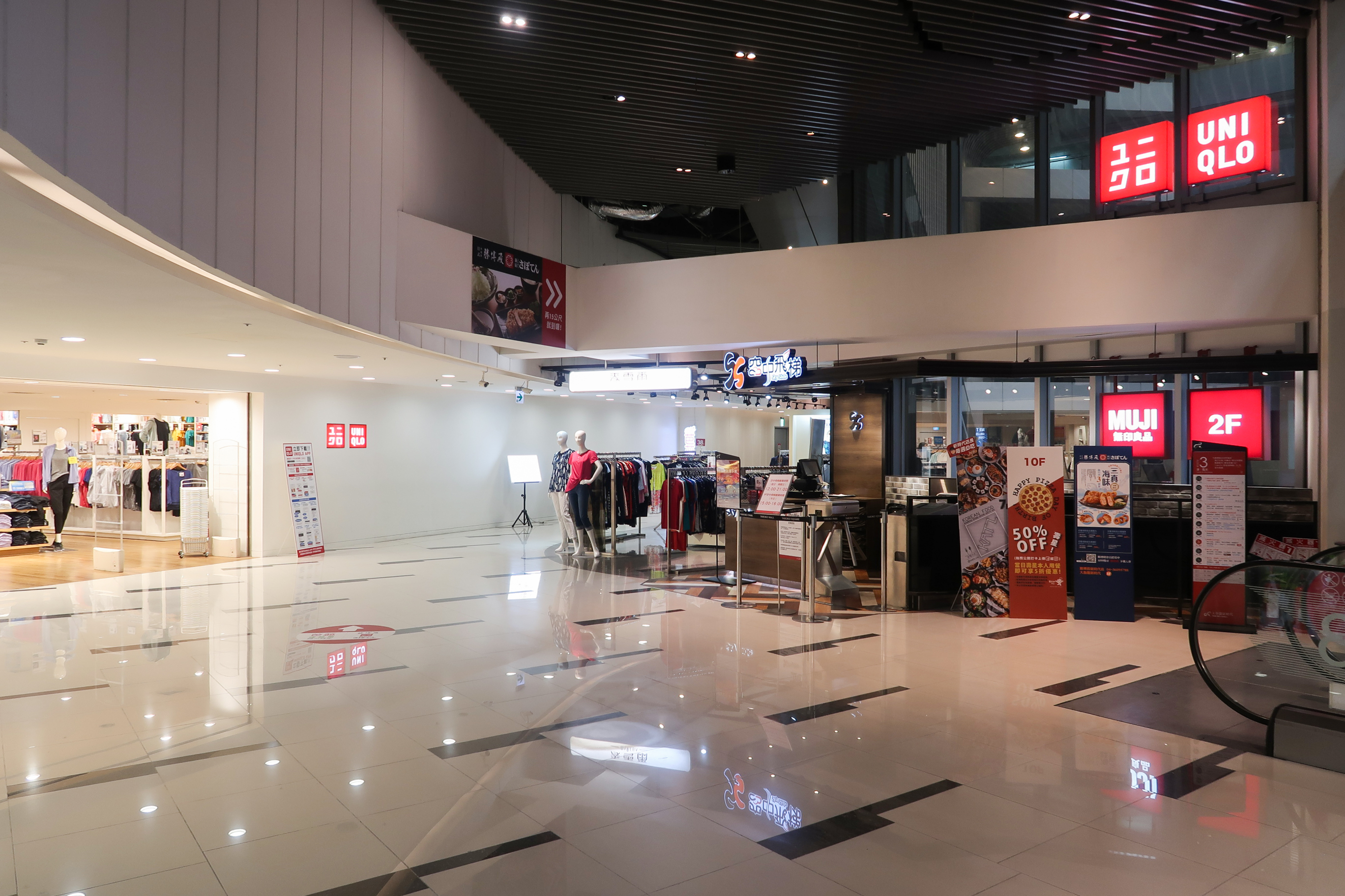 TAROKO MALL Level 3